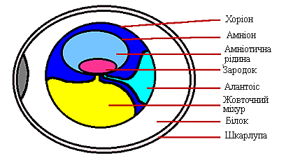 Egganatomy2.gif: Будова пташиного яйця